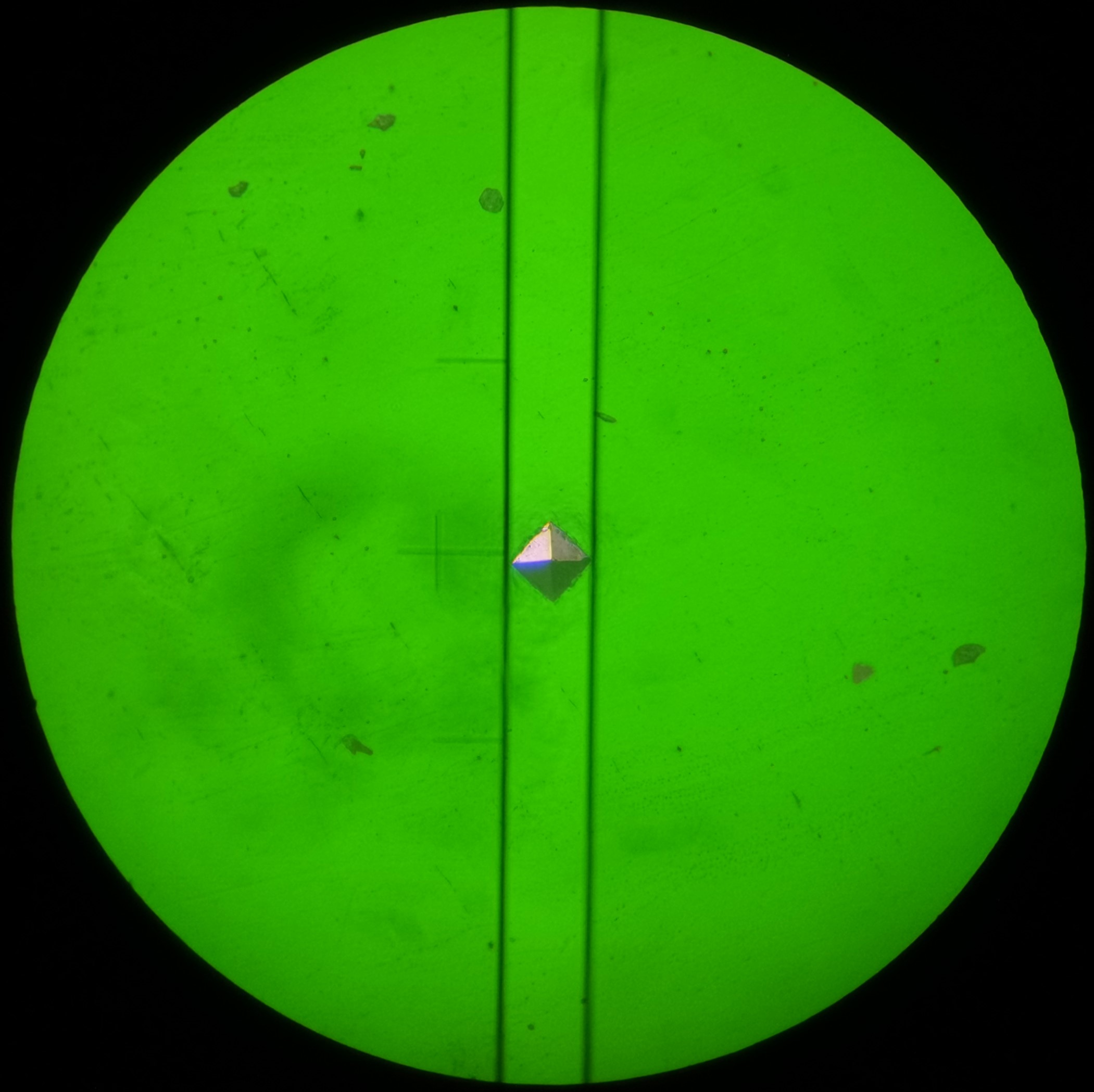 Ini merupakan hasil dari ujikaji Vicker Hardness Test . Ia berbentuk berlian supaya lebar dan panjang alat itu dapat dikaji sertamerta untuk mendapatkan nilai Vicker Hardness (Hv)